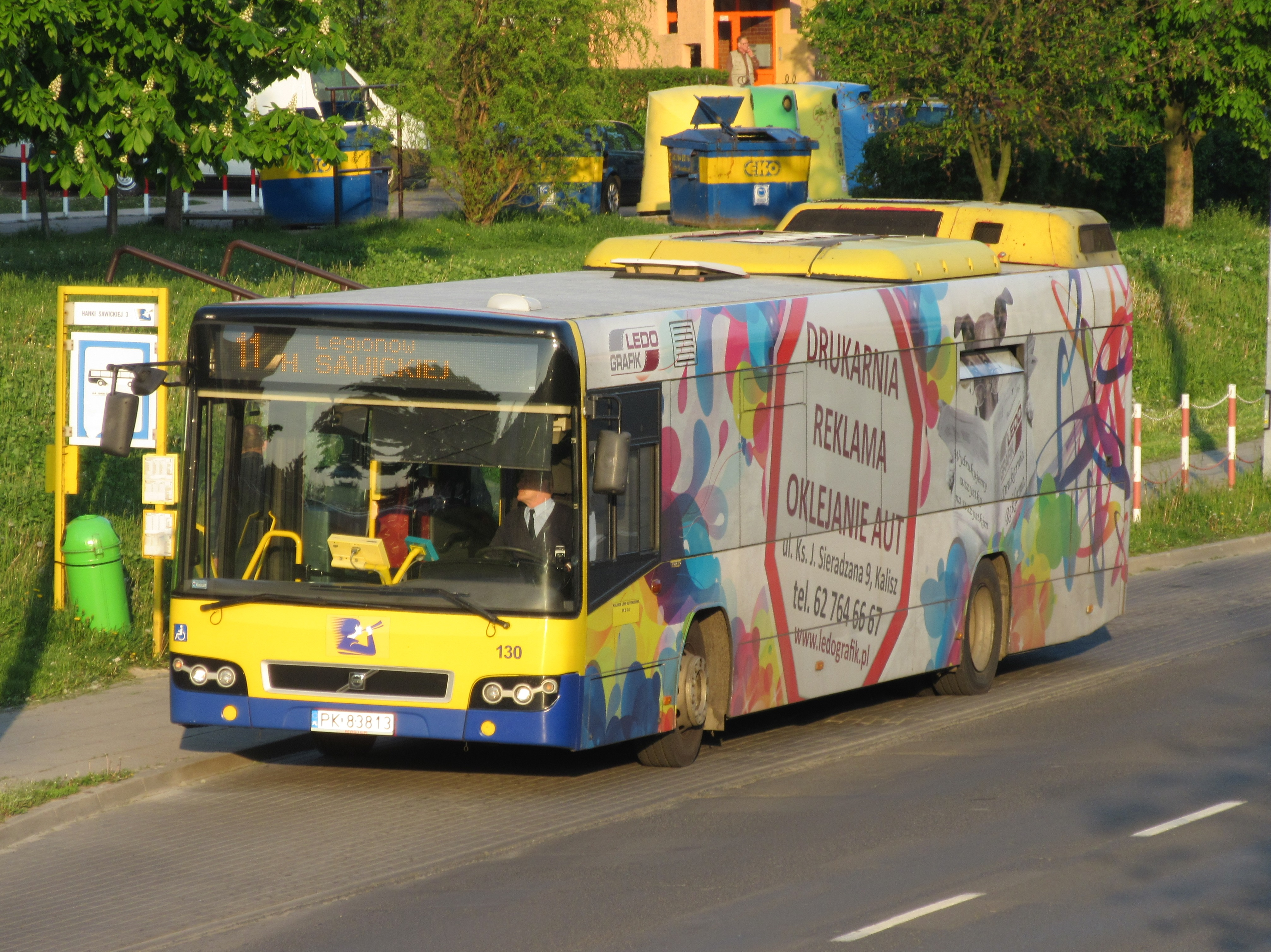 Volvo 7700 Kaliskich Linii Autobusowych na przystanku Sawickiej Arena (ob. Wyszyńskiego Arena) w Kaliszu